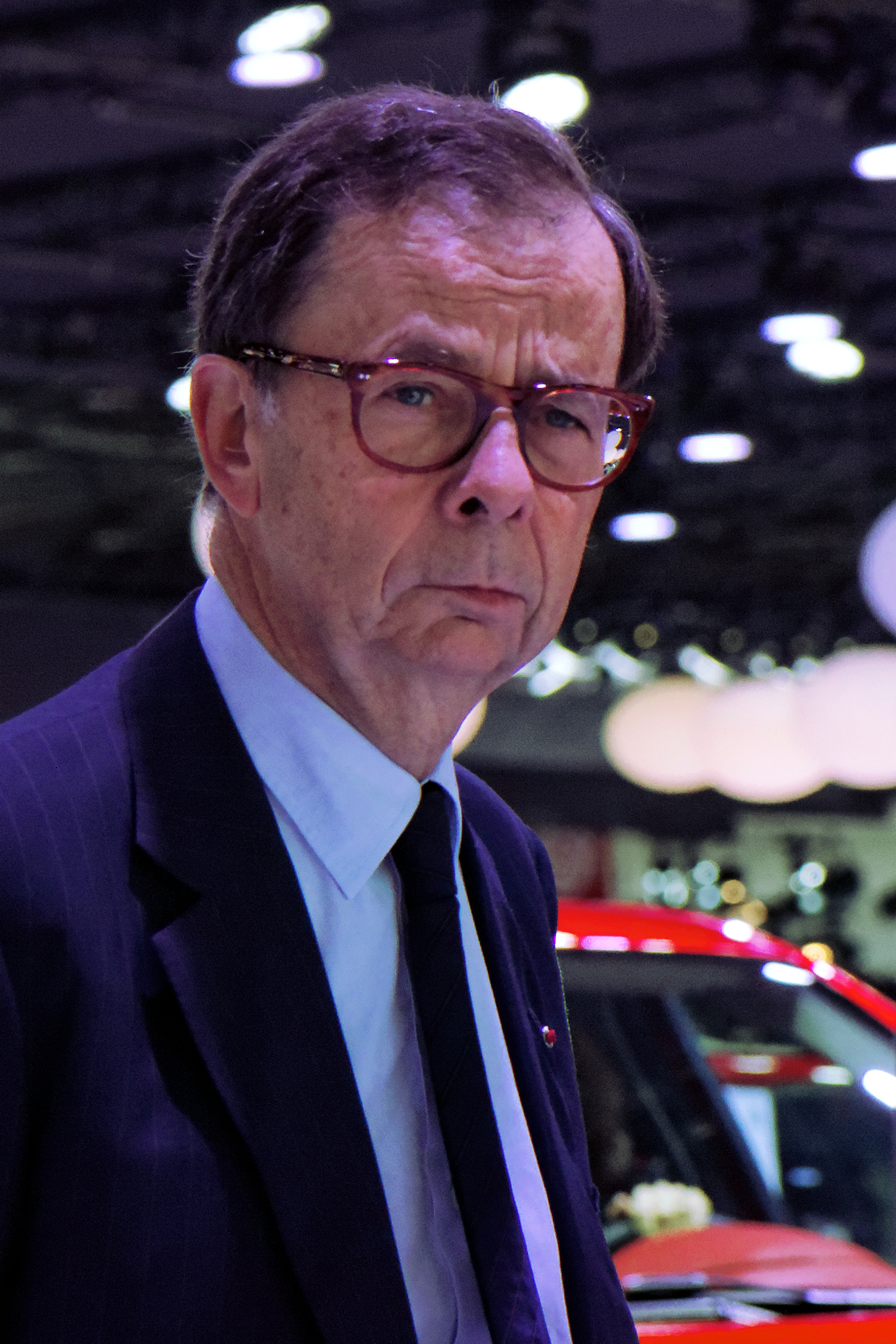 Louis Schweitzer sur le stand Renault lors du Mondial de l'Automobile de Paris 2012.